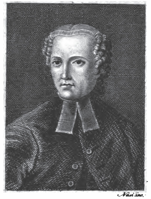 Ritratto del poeta Giovambattista Felice Zappi (1667–1719)